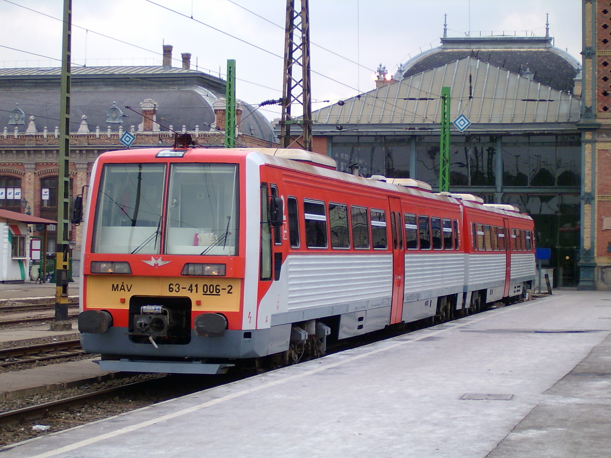 6341 sorozatu motorkocsi.jpg